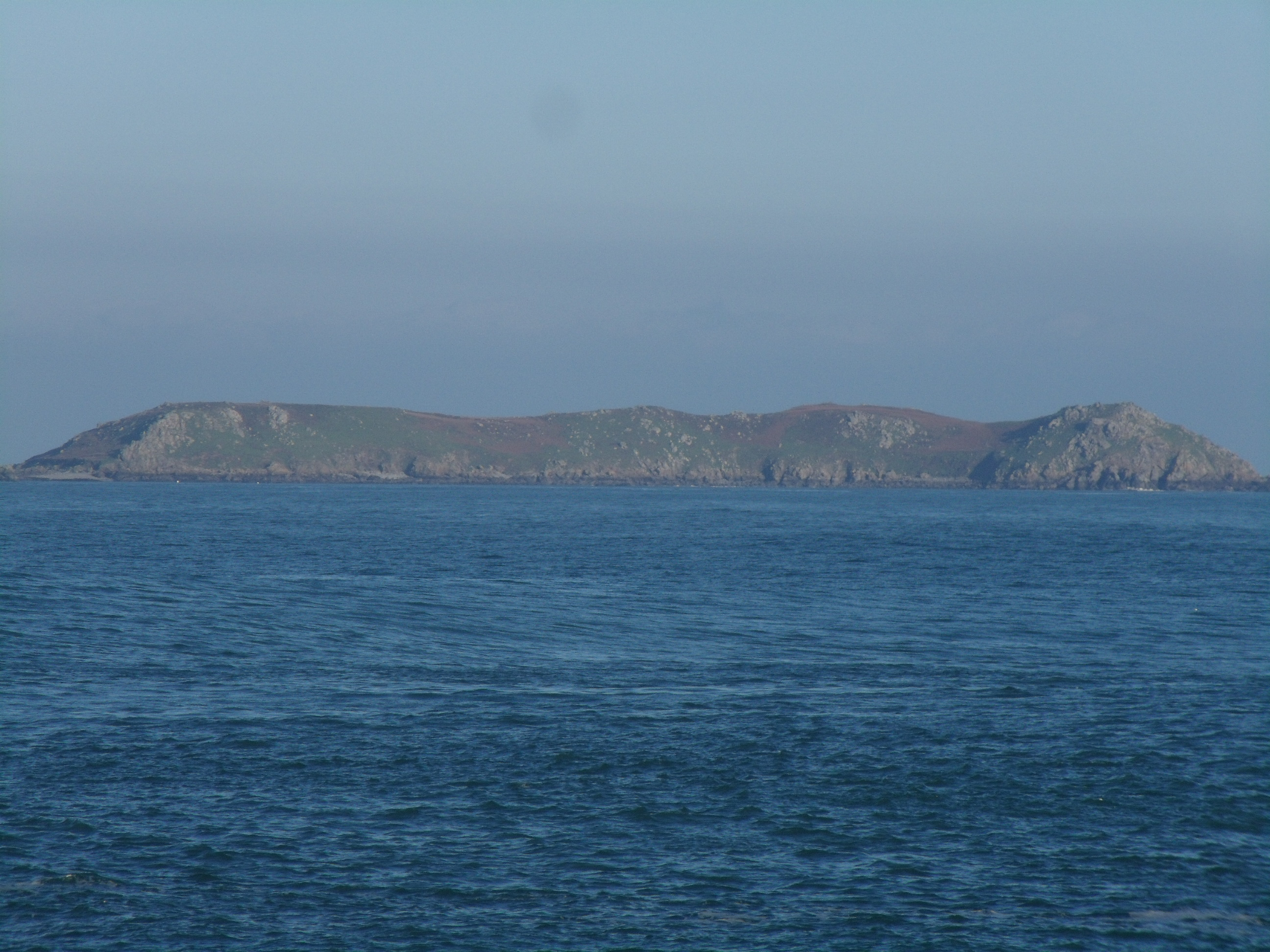 L'Île Bono, une des "Sept-Îles"; Photo prise de Trégastel